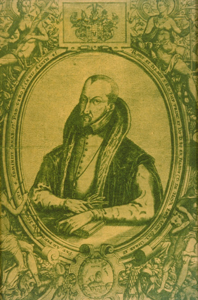 Johann von Hoya Johann IV. Bischof von Osnabrück Johann III. Bischof von Münster Johann II. Bischof von Paderborn